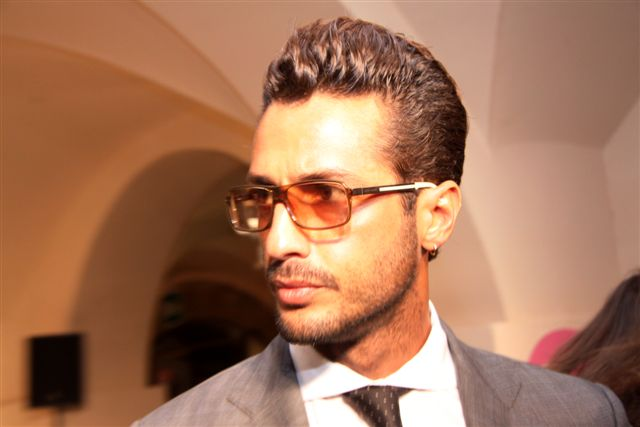 Fabrizio Corona